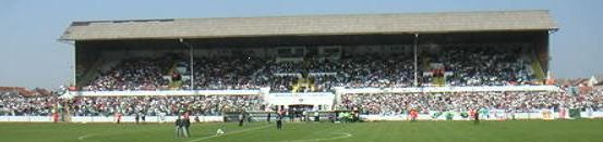 Foto genomen op 3 april 2005, naar aanleiding van de derby Racing Mechelen 0-2 (0-5) KV Mechelen